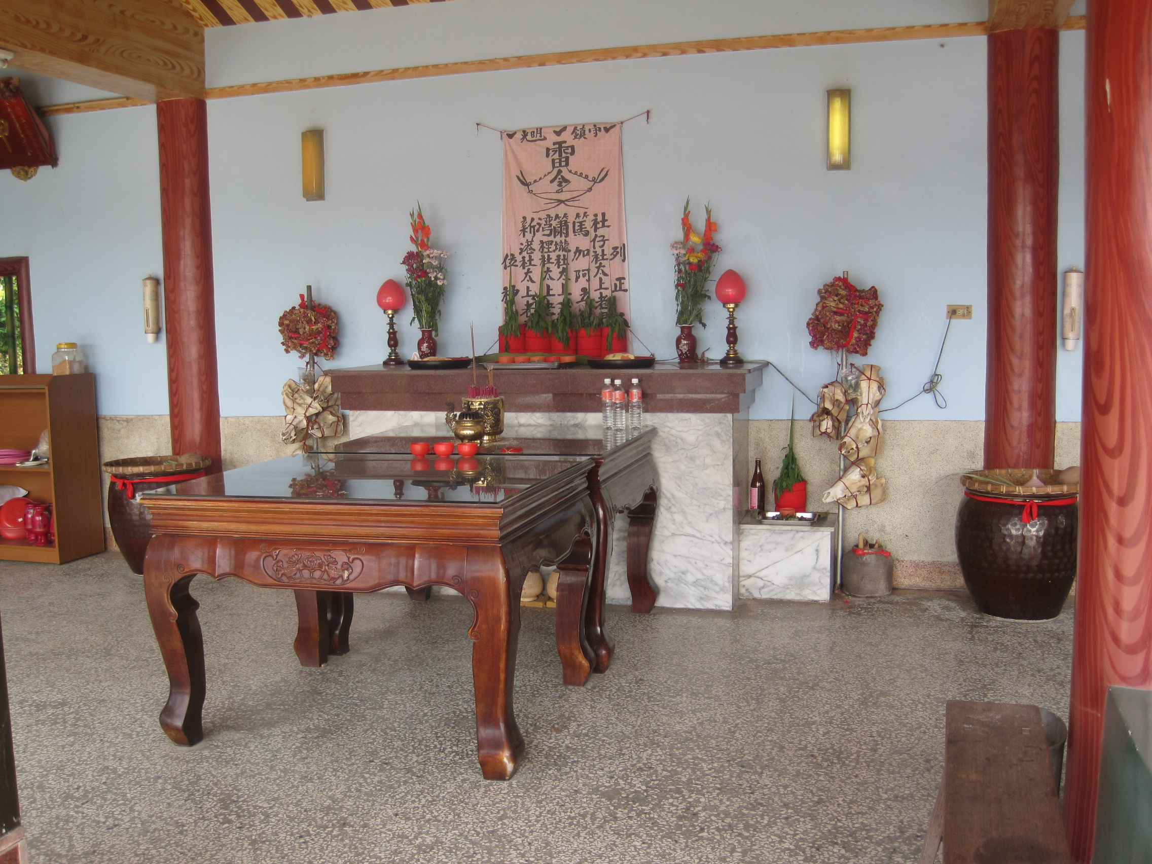 頭社公廨 （太上龍頭忠義廟）內部